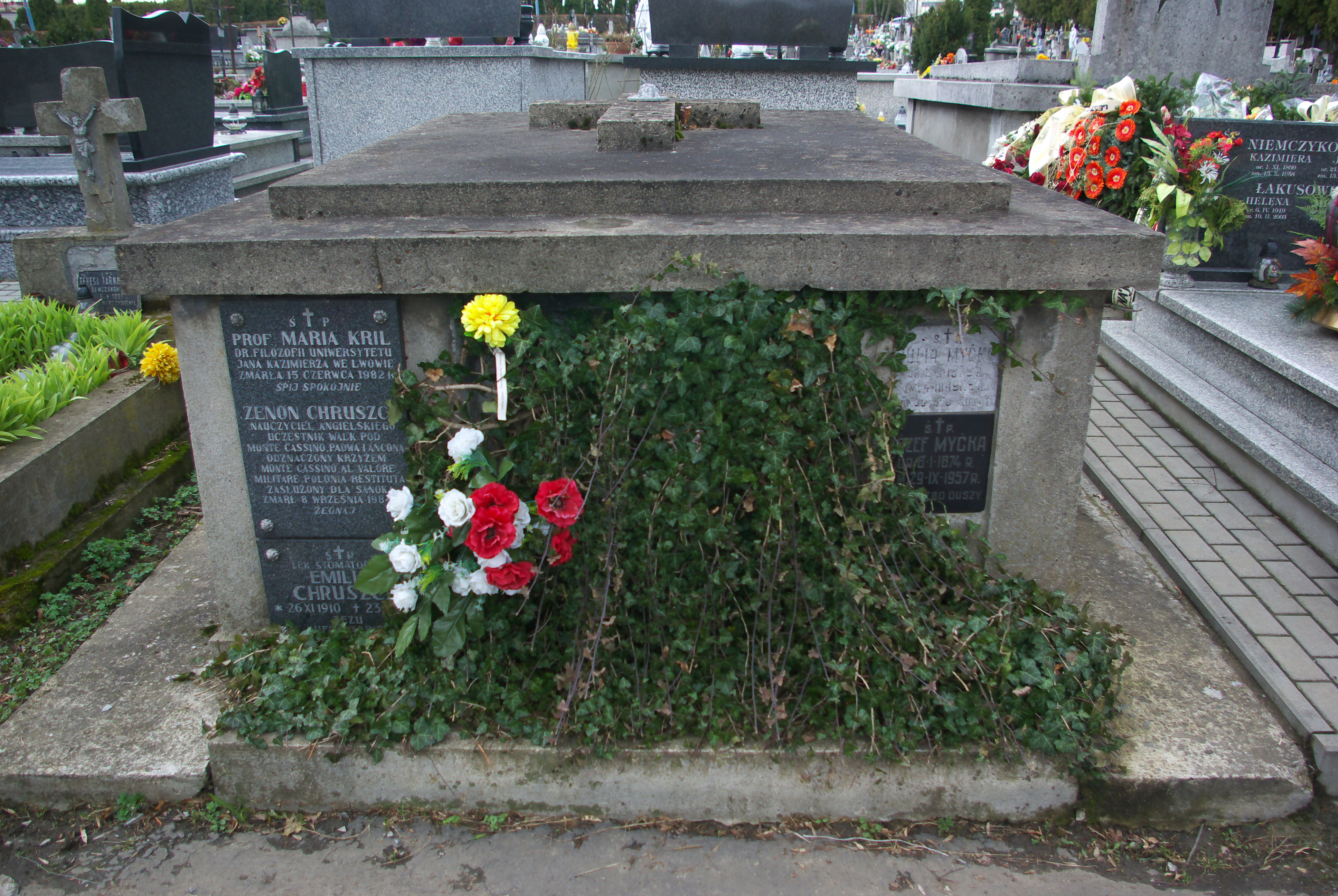 Grobowiec rodziny Myćka w części „Matejki Stary” Cmentarza Centralnego w Sanoku.